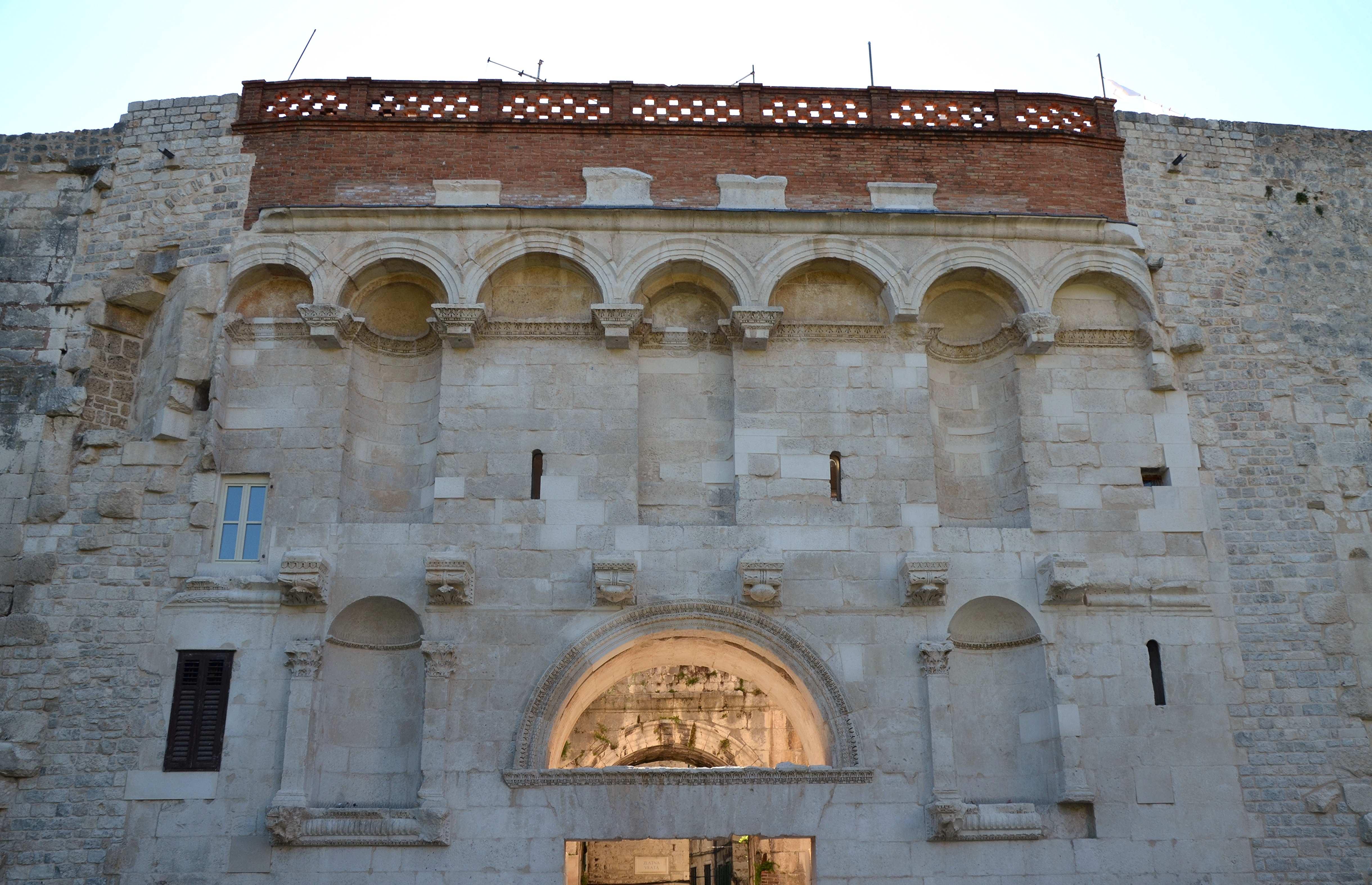 Porta Aurea, Split